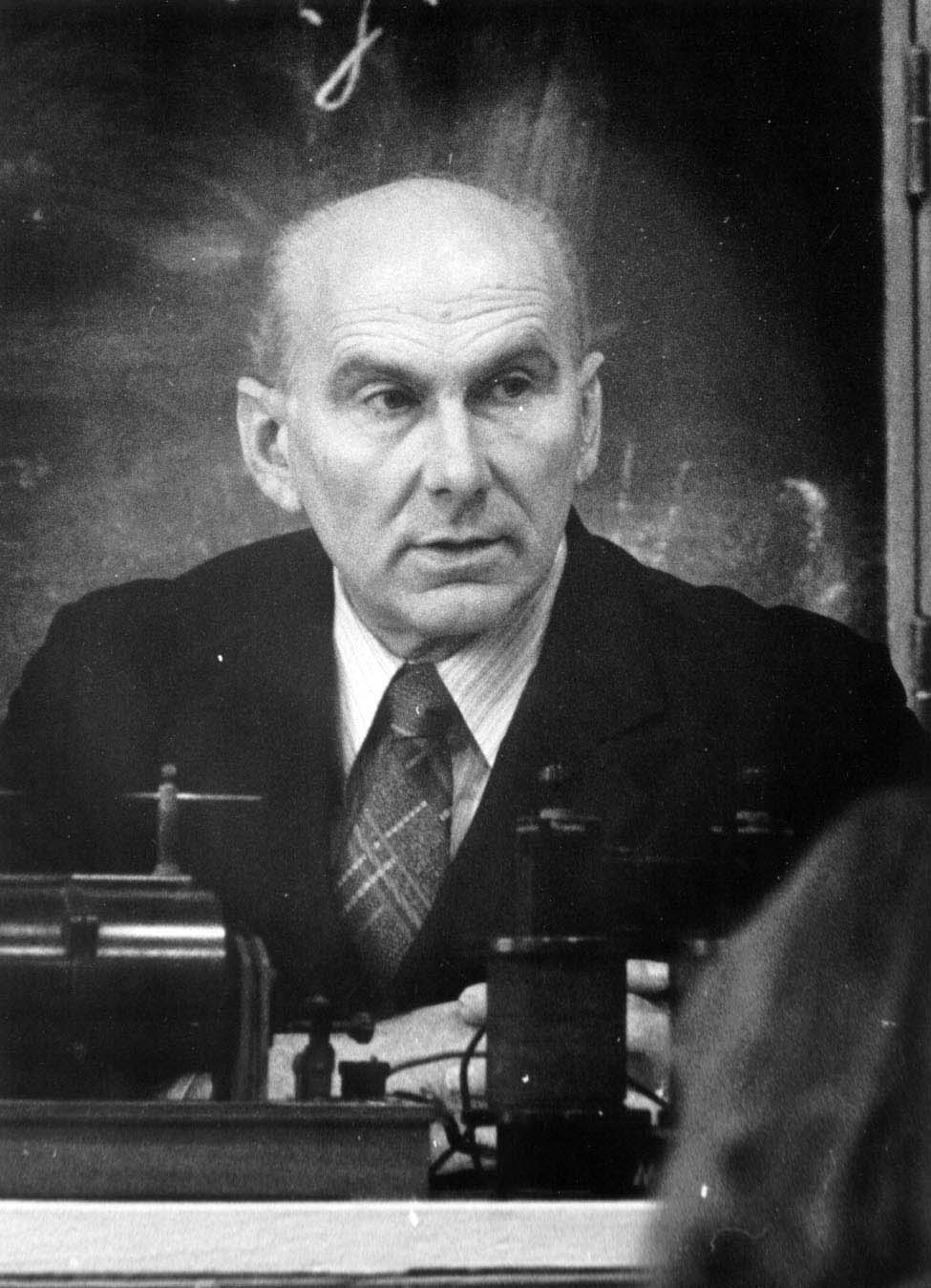 Roberts Akermanis